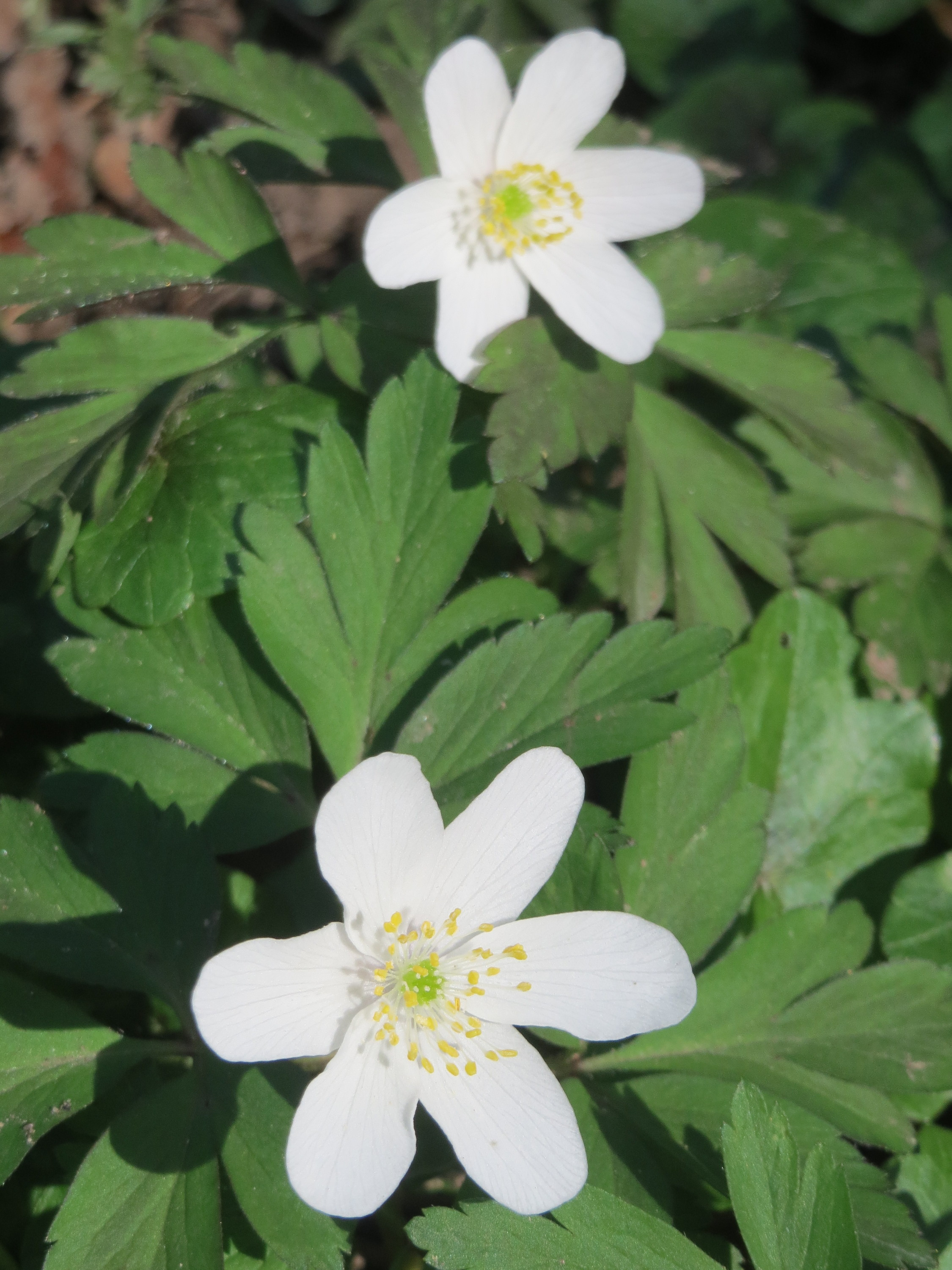 Buschwindröschen (Anemone nemorosa) im Habsterwiesental in Alt-Saarbrücken